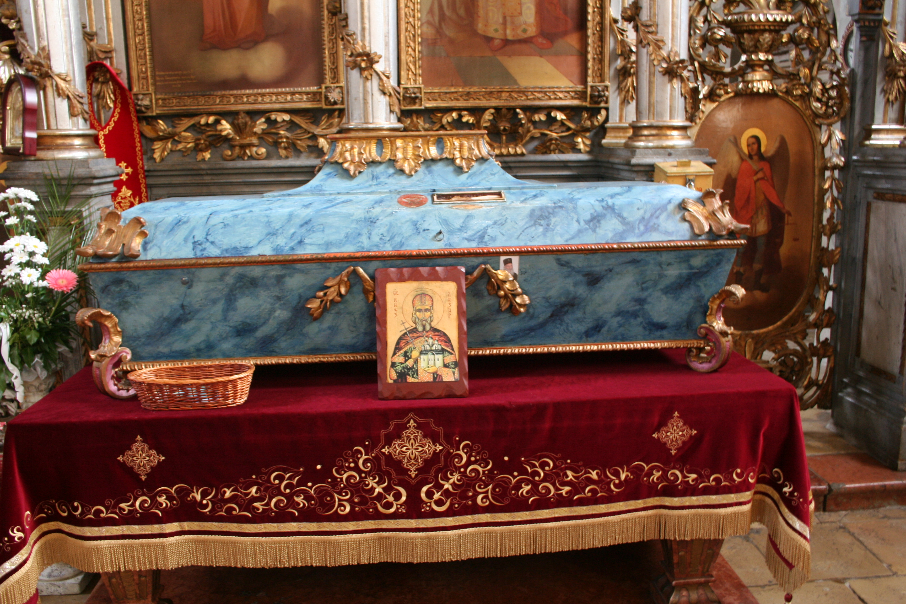 Manastir Vrdnik